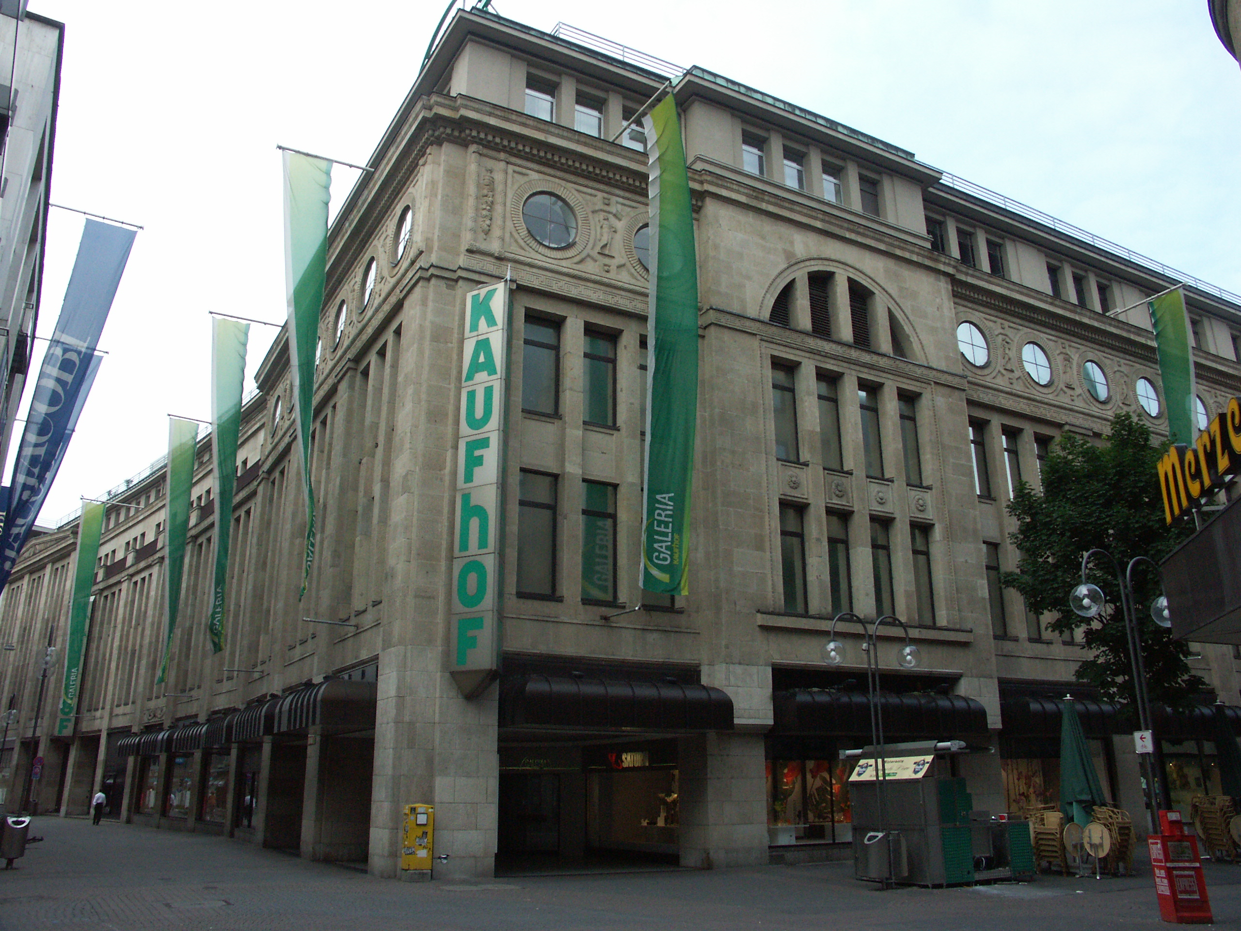 Köln, Hohe Straße, Kaufhof